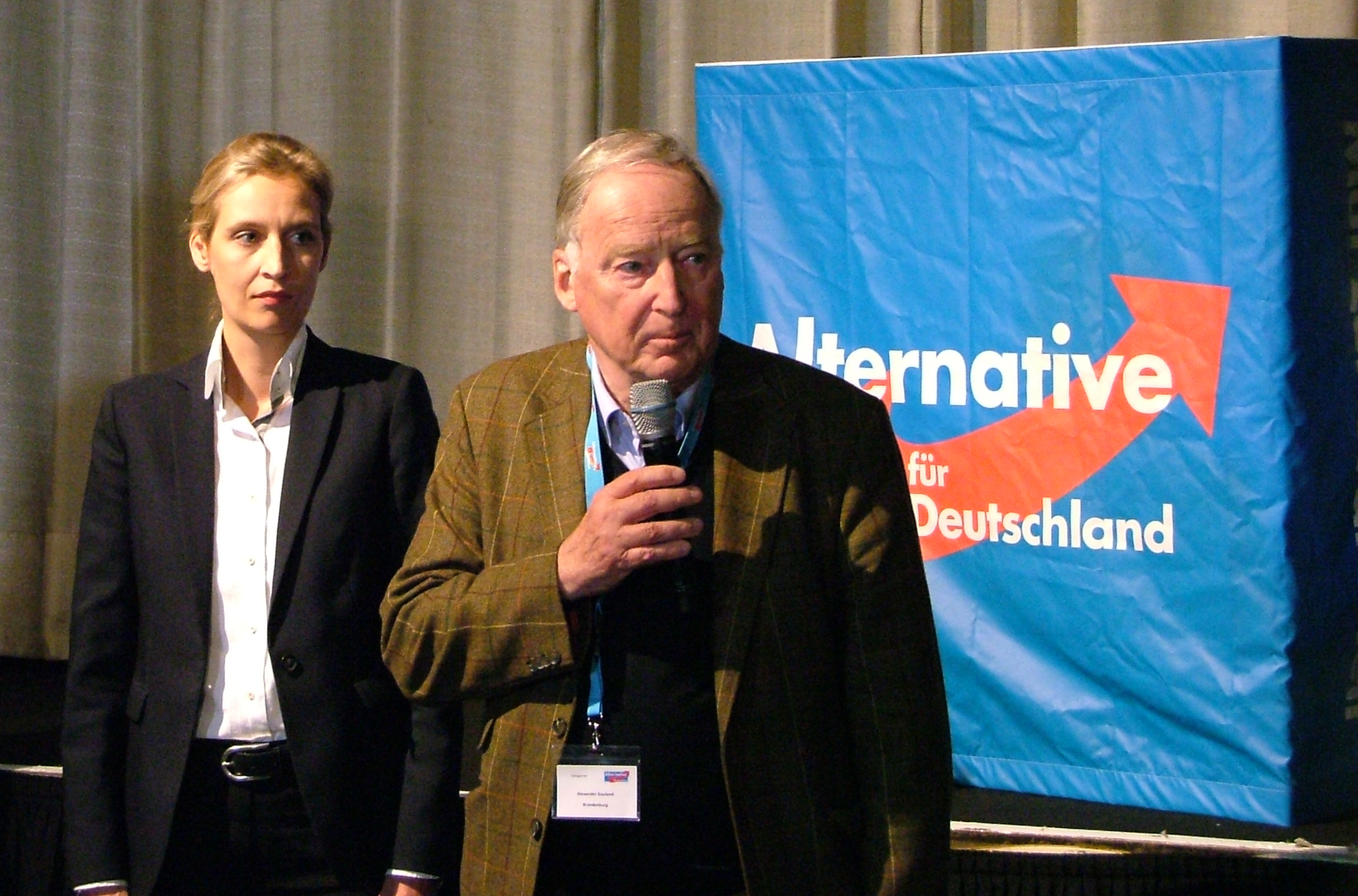 AfD Bundesparteitag am 23. April 2017 in Köln, MARITIM Hotel